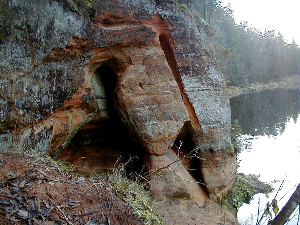 Dauģēnu klintis pie Salacas 2003-11-08